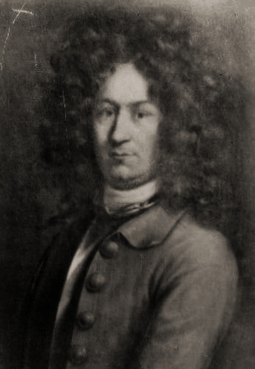 Estonian politician Fabian Ernst Stael von Holstein (1672-1730)